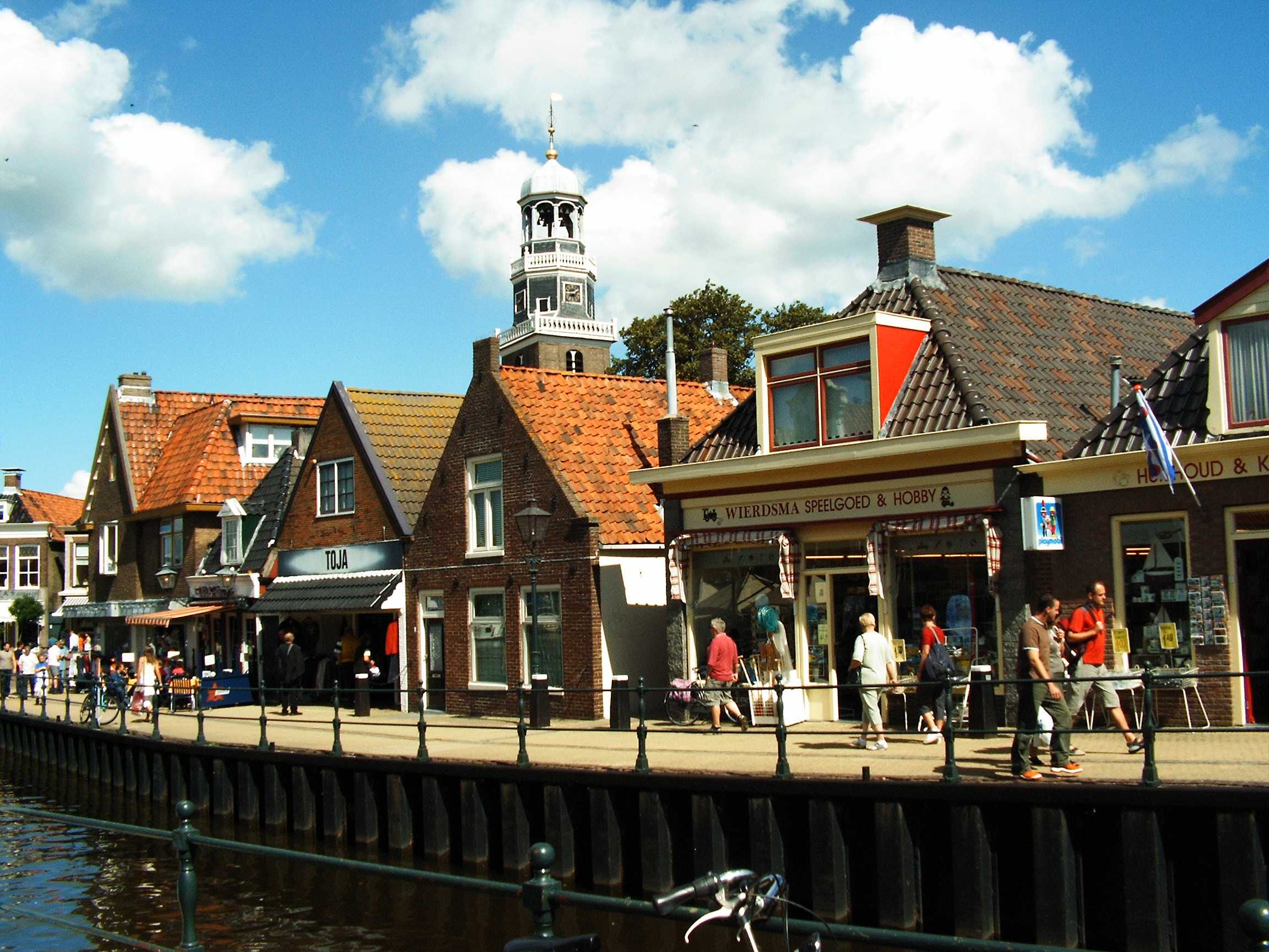 Oude Sluis in Lemmer Friesland